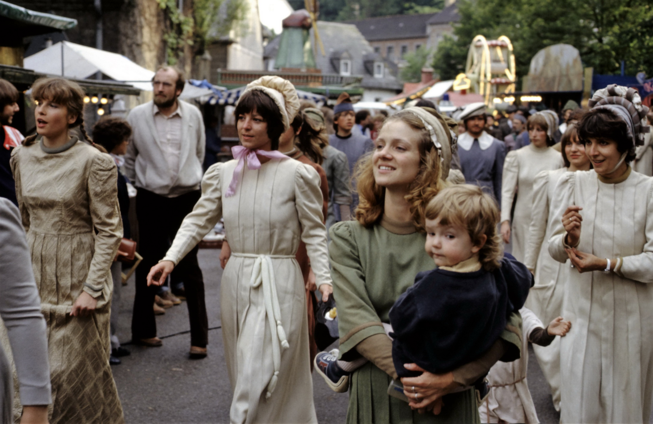 Historischer Jahrmarkt Kornelimünster 1981